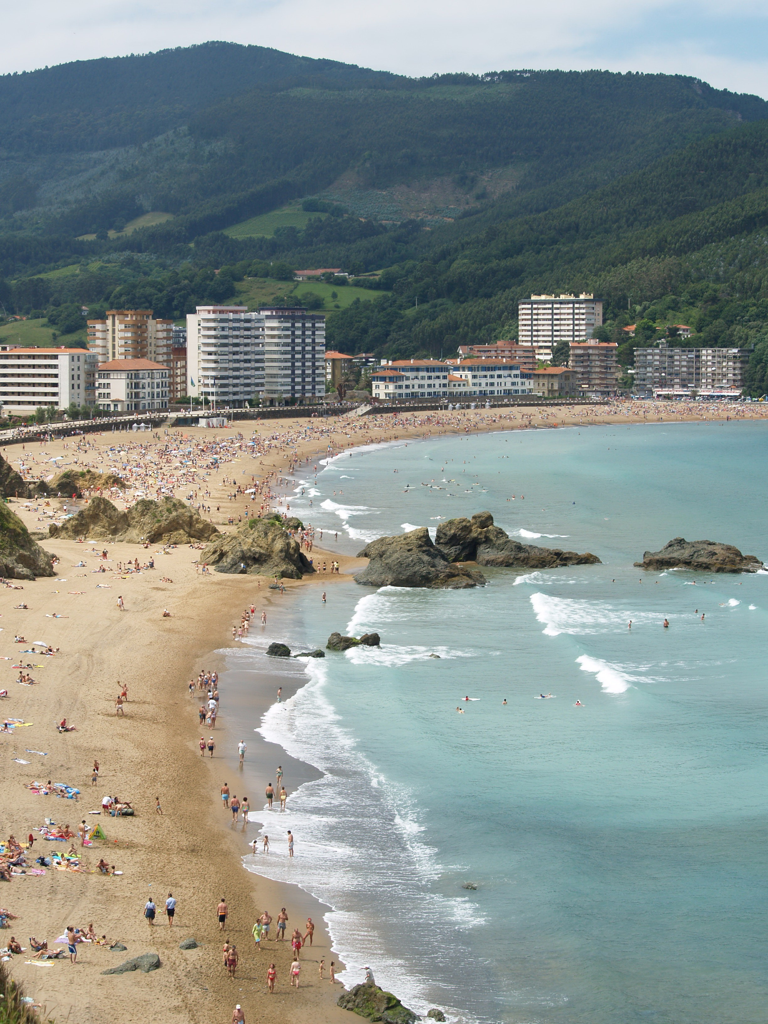 Playa de Bakio en un día de julio